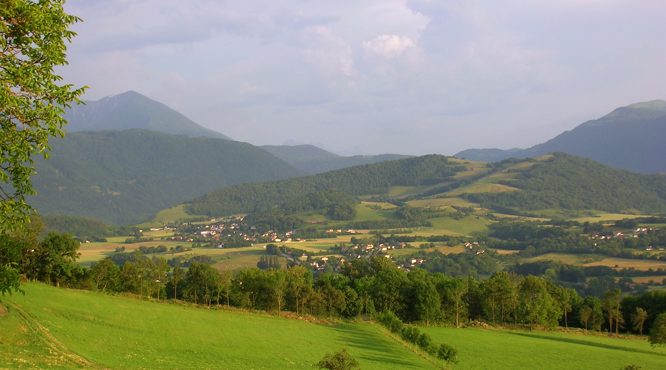 Panorama de Herbeys et Brié-et-Angonnes, par le Chemin du Châtelard d'Herbeys.